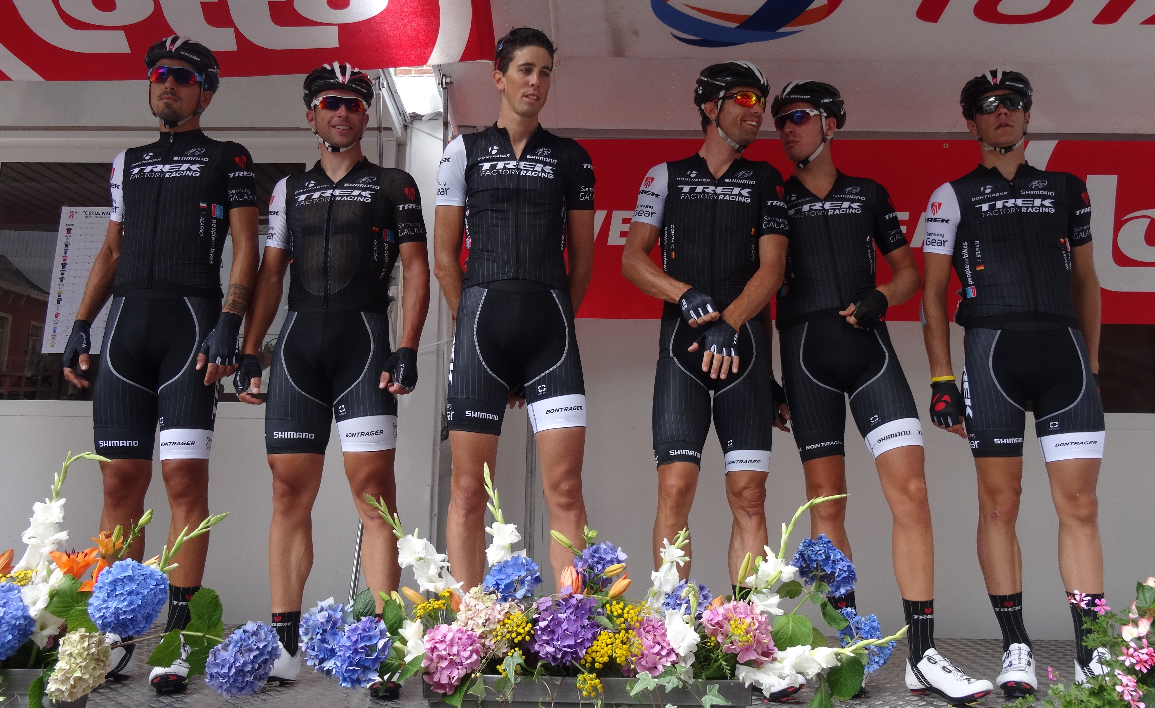 Reportage photographique réalisé le samedi 26 juillet à l'occasion du départ de la première étape du Tour de Wallonie 2014 à Frasnes-lez-Anvaing, Belgique.